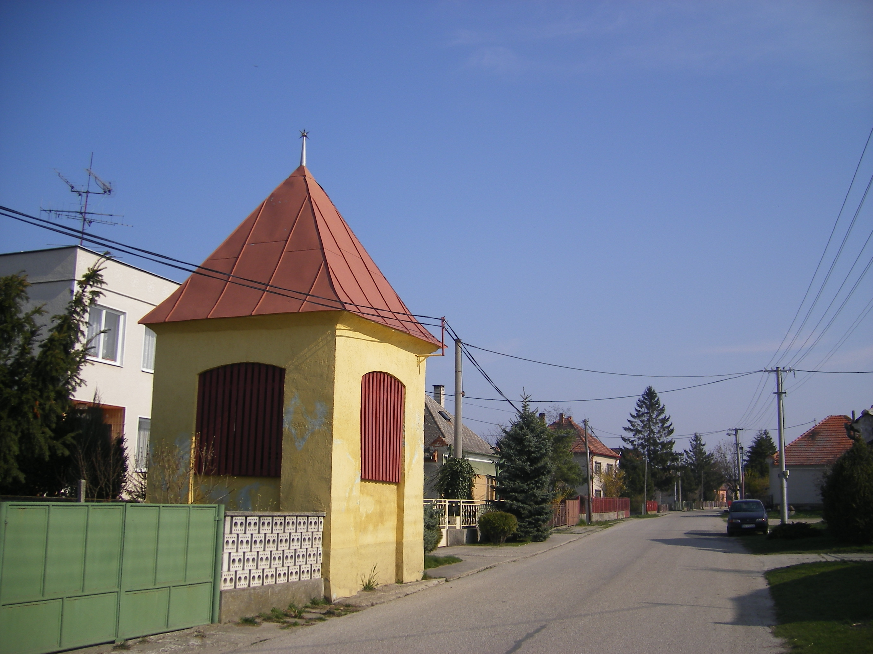 Szilas, református harangláb